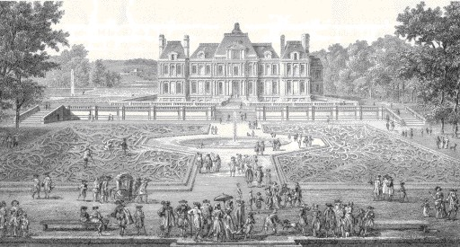 Vue du château de Maisons au XVIIe siècle Maisons-Laffitte Catégorie:Image de Maisons-Laffitte Maisons-Laffitte